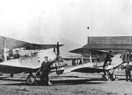 Die ersten Flugzeuge vom Typ De Havilland D.H.60 Gipsy Moth der Línea Aeropostal Santiago - Arica und danach der Línea Aérea Nacional